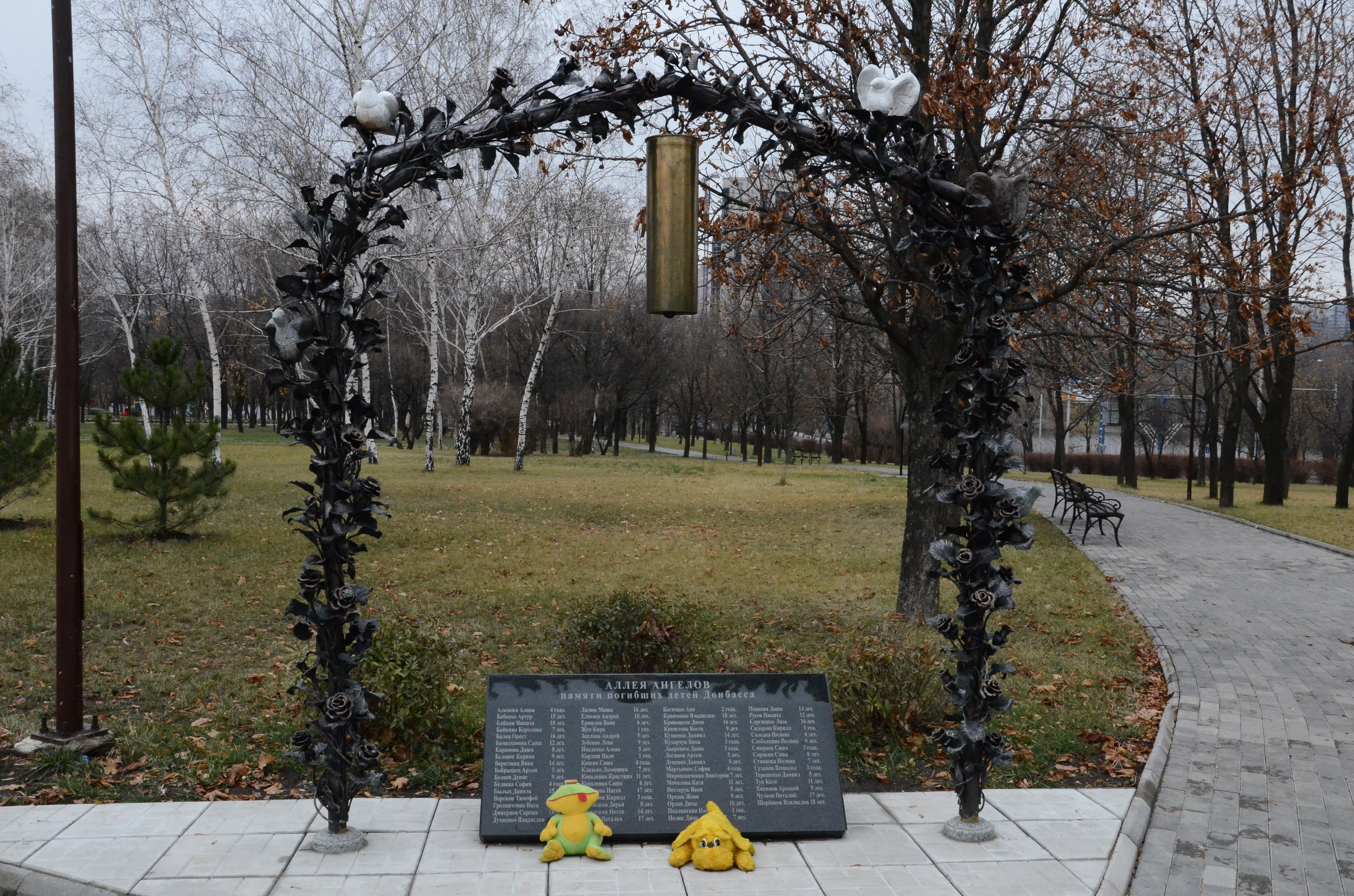 Аллея ангелов в Донецке. Памяти погибших детей Донбасса